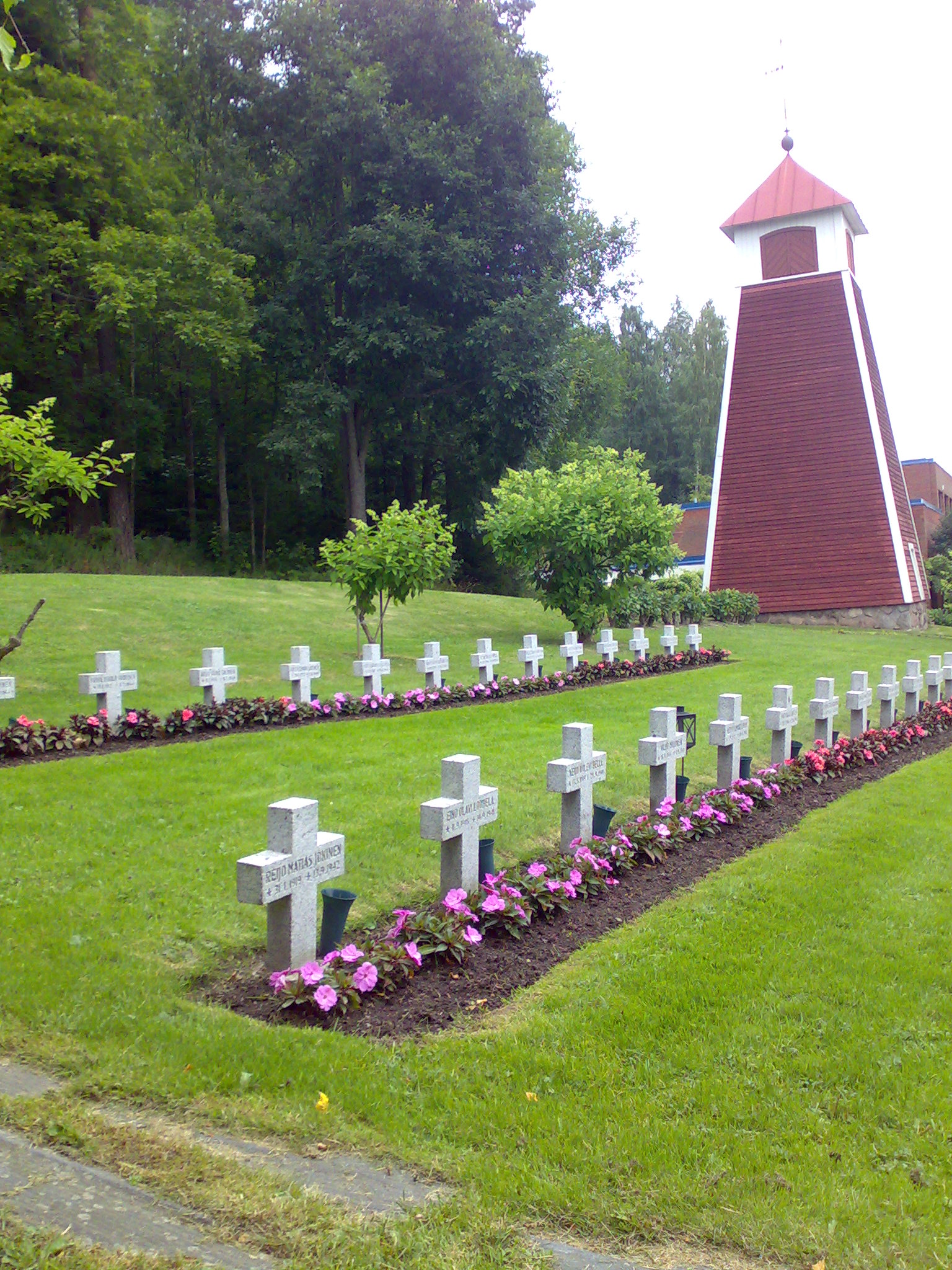 Tervakosken kirkon kellotapuli ja sankarihaudat